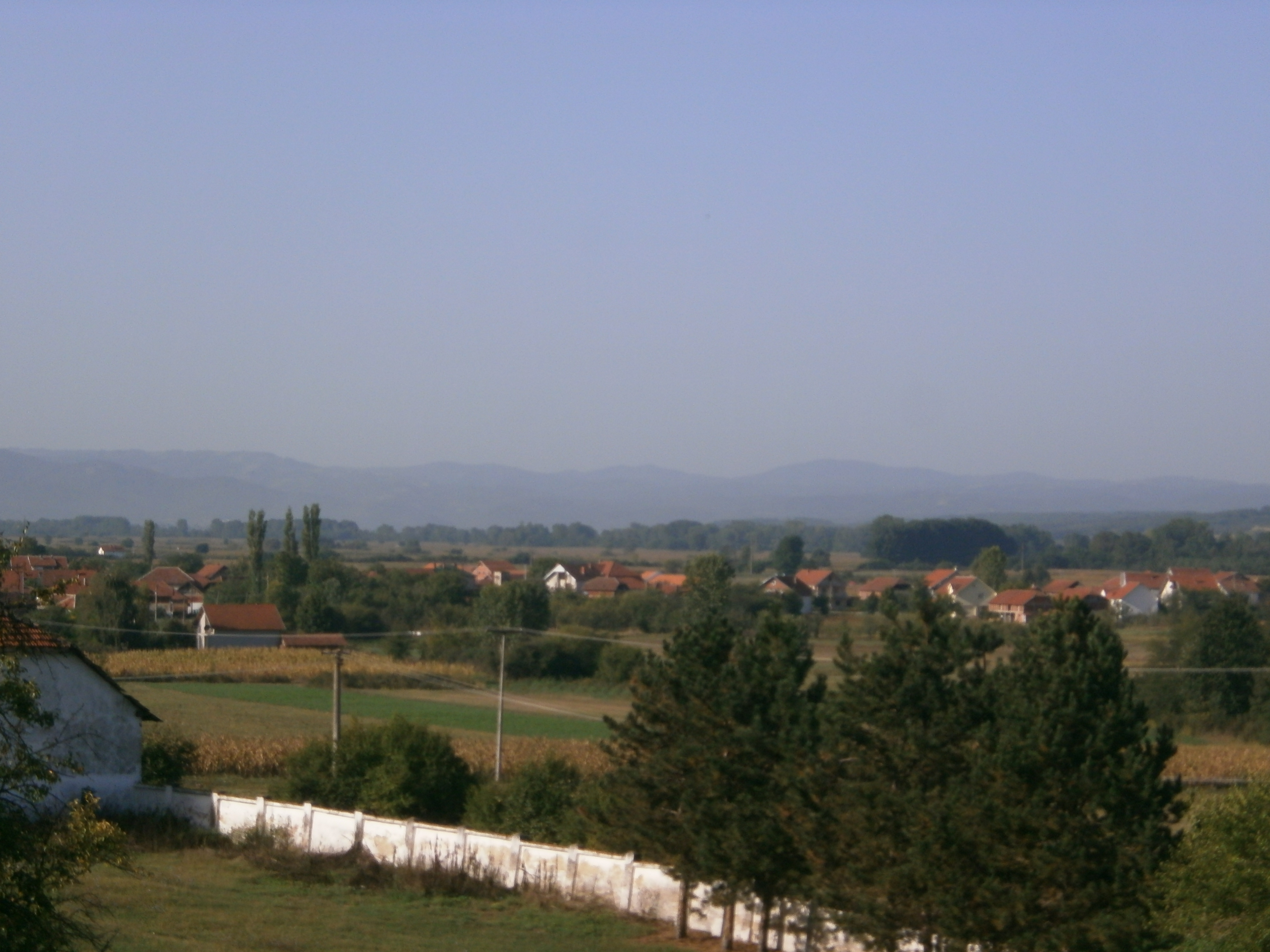 Srpski (latinica): Rudare, Leskovac